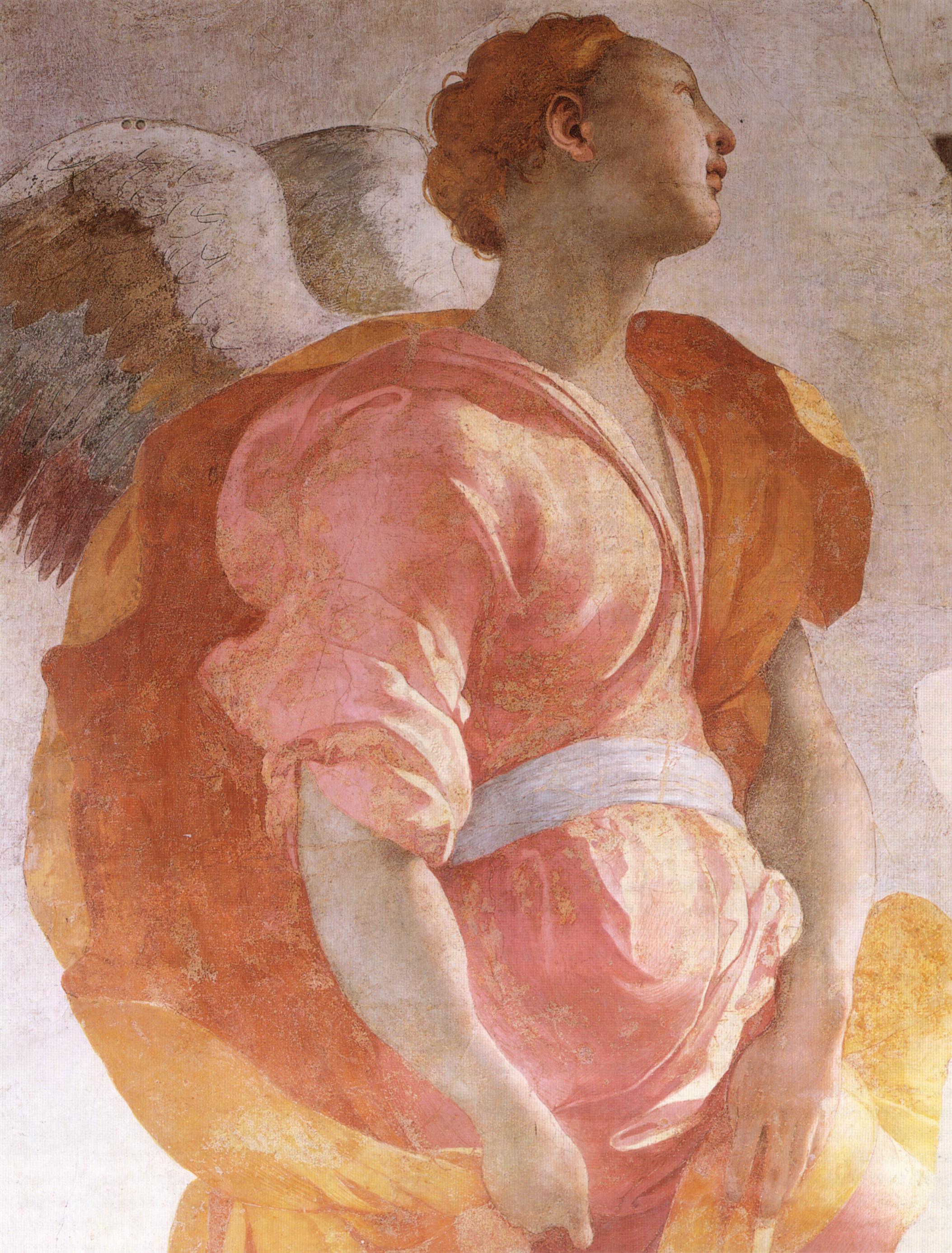 Pontormo, annunciazione, dett